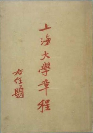 中文（中国大陆）: 1920年代，于右任题写的《上海大学章程》封面。